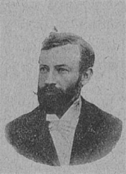 Václav Perek (1859-1940), rakouský právník a politik původem z Čech, působící na Moravě; poslanec Moravského zemského sněmu